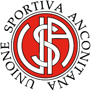 Logo Unione Sportiva Anconitana ASD